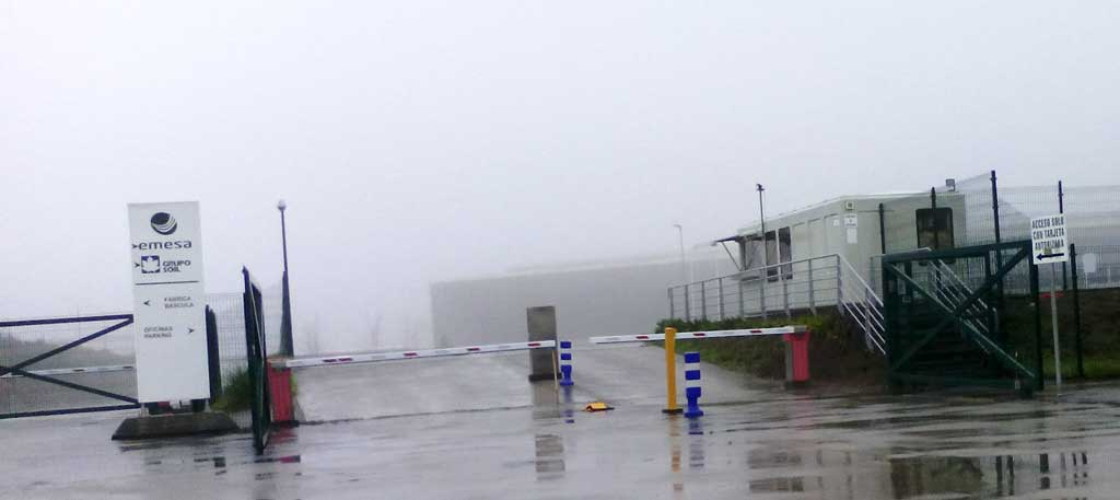 Emesa en Coirós.